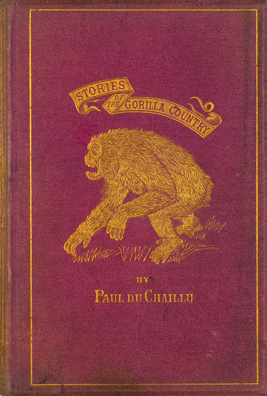 Cover, gilt fabric